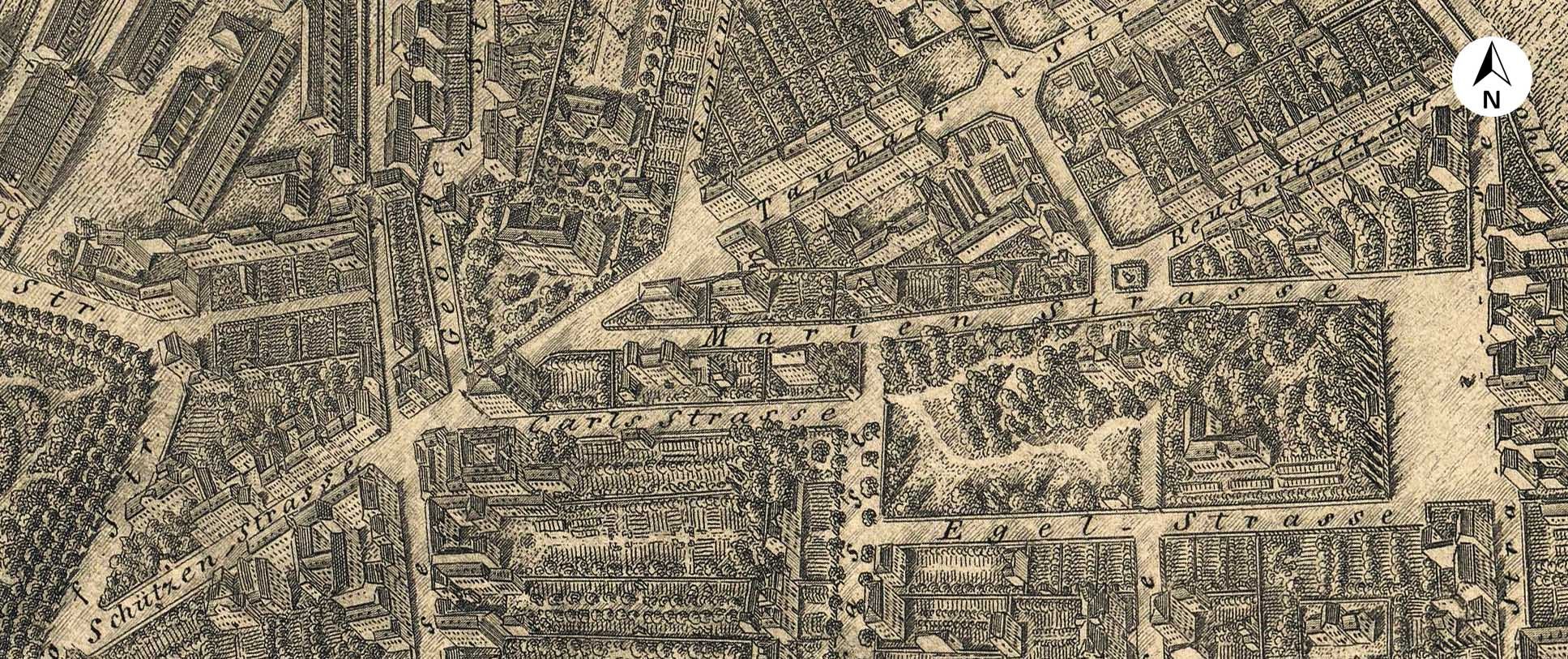 Milchinsel in Leipzig auf einem Plan aus dem Jahr 1847